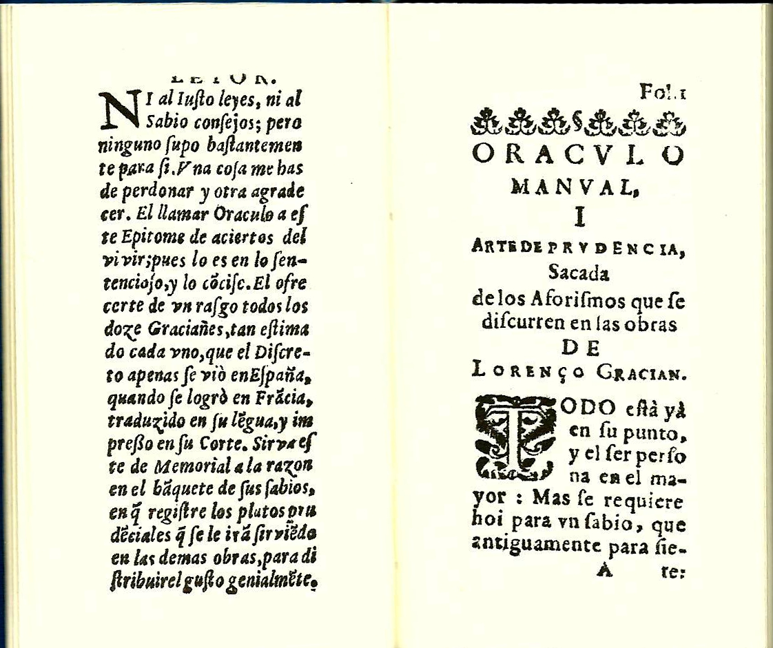 Última página de los preliminares (prólogo) y folio 1 recto de Baltasar Gracián, Oráculo manual y arte de prudencia..., Huesca, Juan Nogués, 1647. Descripción analítica: ORACVLO/ MANVAL,/ Y/ ARTE DE PRVDENCIA./ SACADA/ DE LOS AFORISMOS/ QUE SE DISCVRREN/ En las obras de/ LORENÇO GRACIAN./ PVBLICALA/ D. VICENCIO/ IVAN DE LASTANOSA,/ I la dedica/ Al Excelentissimo Señor:/ D. LVIS MENDEZ/ DE HARO,/ CONDE DVQUE.// Con licencia: Impresso en/ Huesca, por Iuan No-/gues. Año 1647. Hojas en 24º, 209 ff. + 210r; 210vº con fe de erratas. Texto: Ni al justo leyes, ni al sabio cosejos; pero ninguno supo bastantemente para sí. Una cosa me has de perdonar y otra agradecer. El llamar Oráculo a este epítome de aciertos del vivir, pues lo es en lo sentencioso y lo conciso. El ofrecerte de un rasgo todos los doce gracianes, tan estimado cada uno que el Discreto apenas se vio en España cuando se logró en Francia, traducido en su lengua, e impreso en su Corte. Sirva este de memorial a la razón en el banquete de sus sabios, en que registre los platos prudenciales que se le irán sirviendo en las demás obras, para distribuir el gusto genialmente. Fol. I [r.] ♣♣♣♣♣§♣♣♣♣♣ ORÁCULO MANUAL, I ARTE DE PRUDENCIA Sacada de los aforismos que se discurren en las obras DE LORENÇO GRACIÁN. TODO está ya en su punto, y el ser persona en el mayor: más se requiere hoy para un sabio, que antiguamente para sie- [te